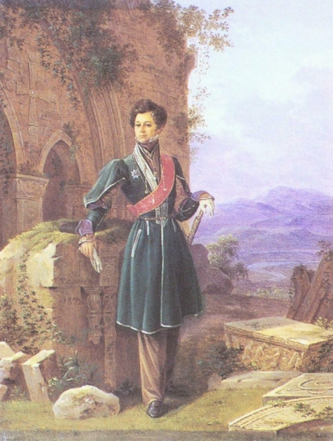 Кутайсов Павел Иванович (1780-1840), камергер, почетный командор Мальтийского ордена.